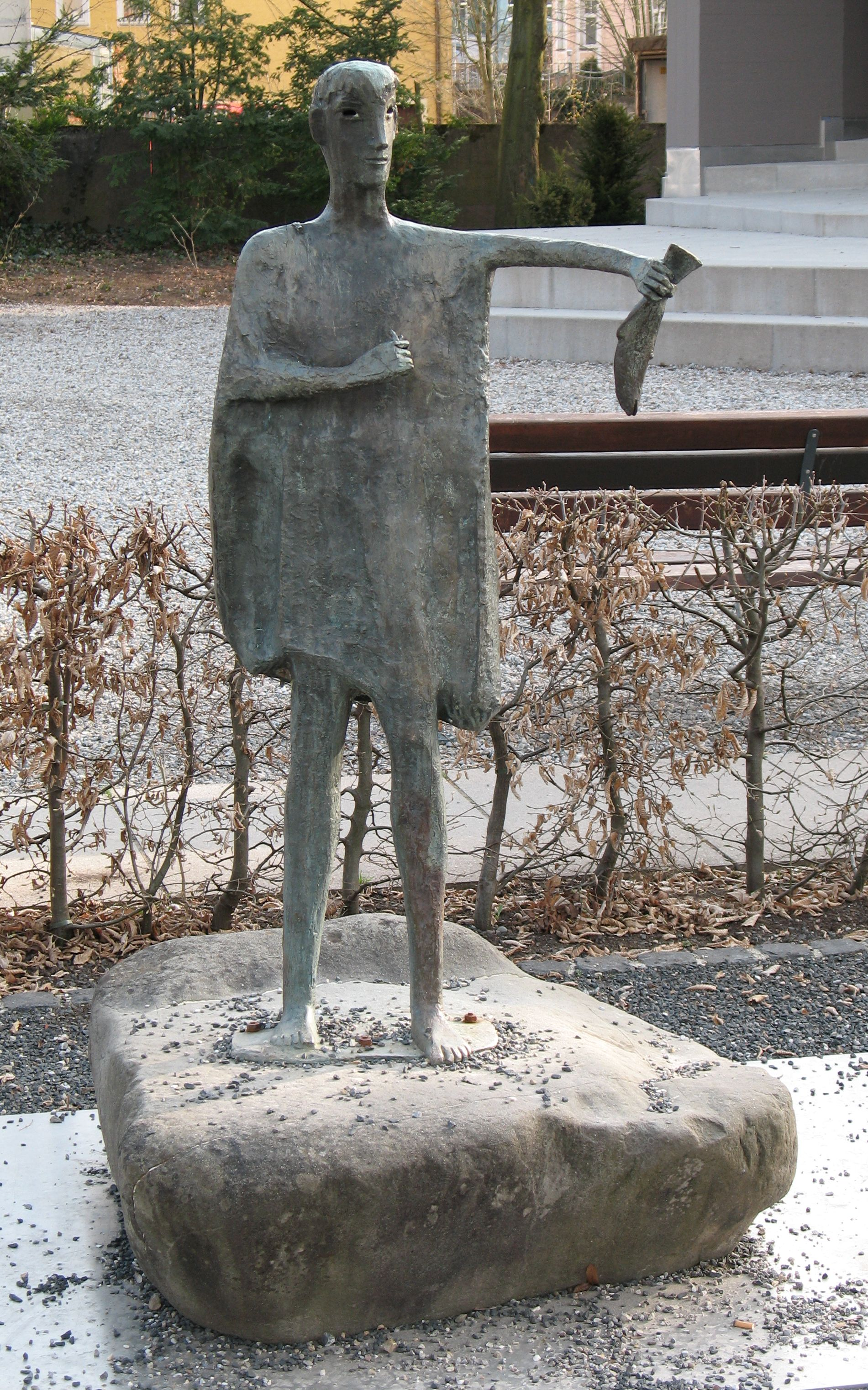 Theo Bechteler: "Der Fischer" in der Hofgarten-Anlage in Immenstadt